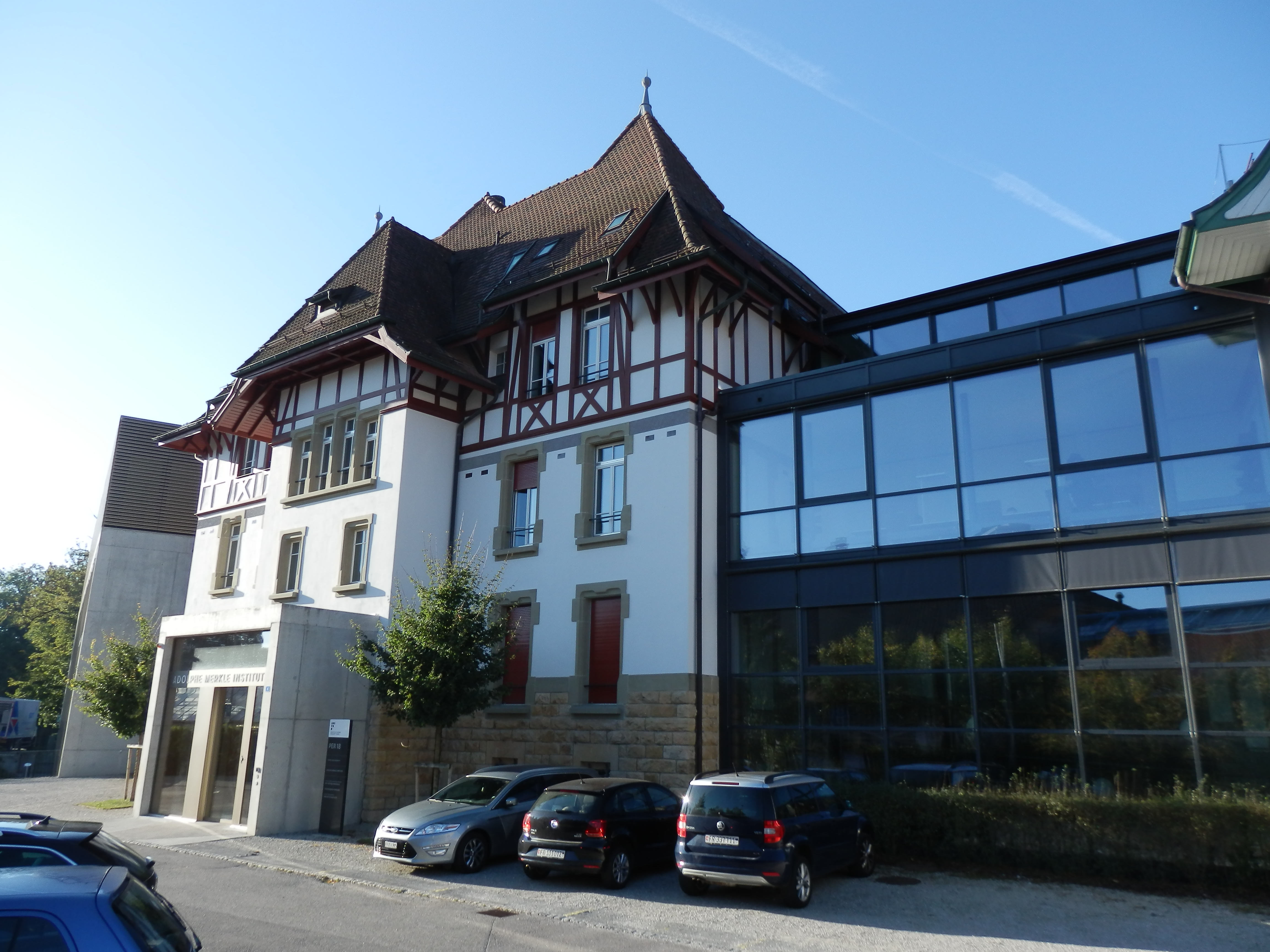 Facciata dell'Adolphe Merkle Institut a Friburgo (Svizzera), Chemin des Verdiers.